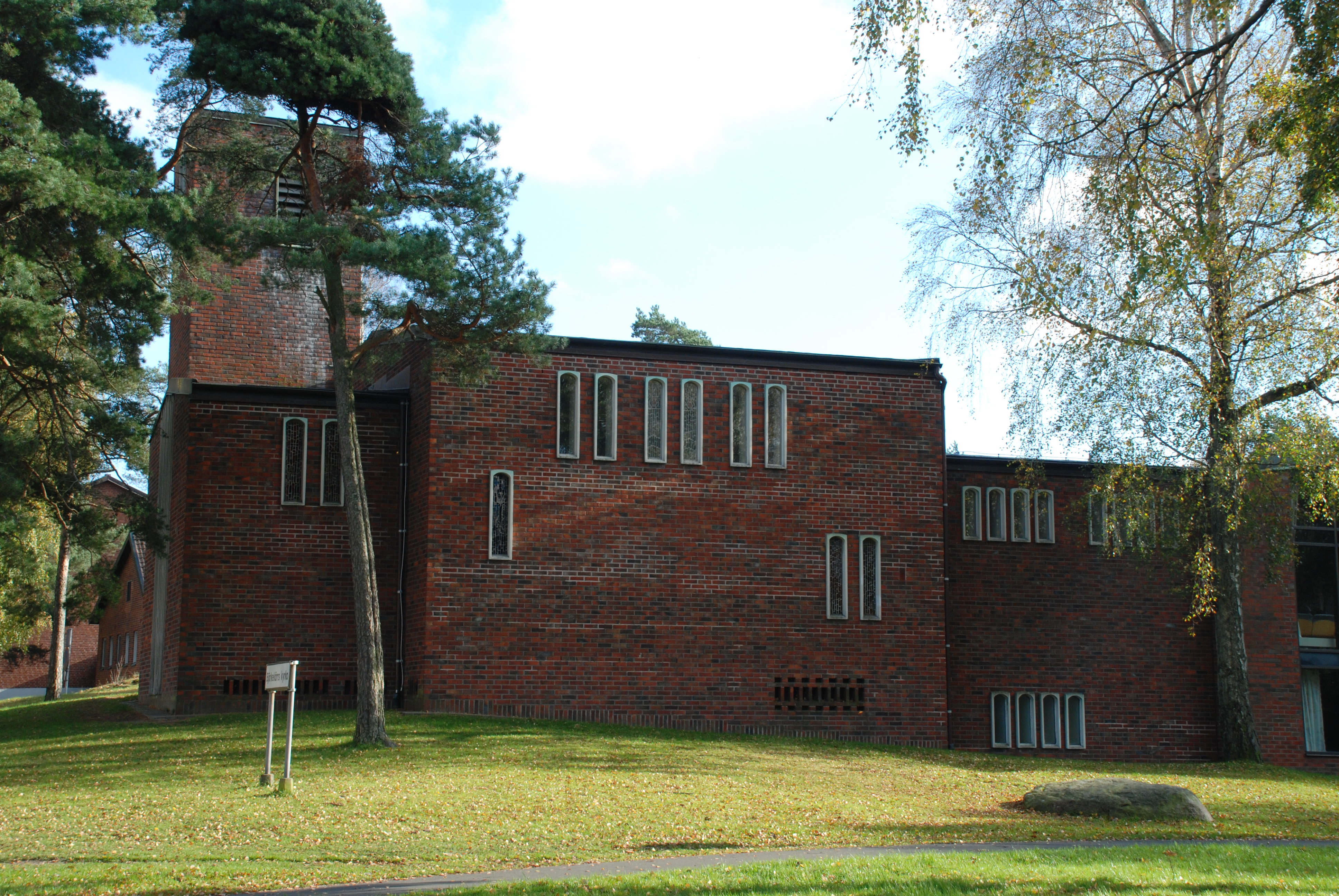 Björkekärrs kyrka i Göteborg.